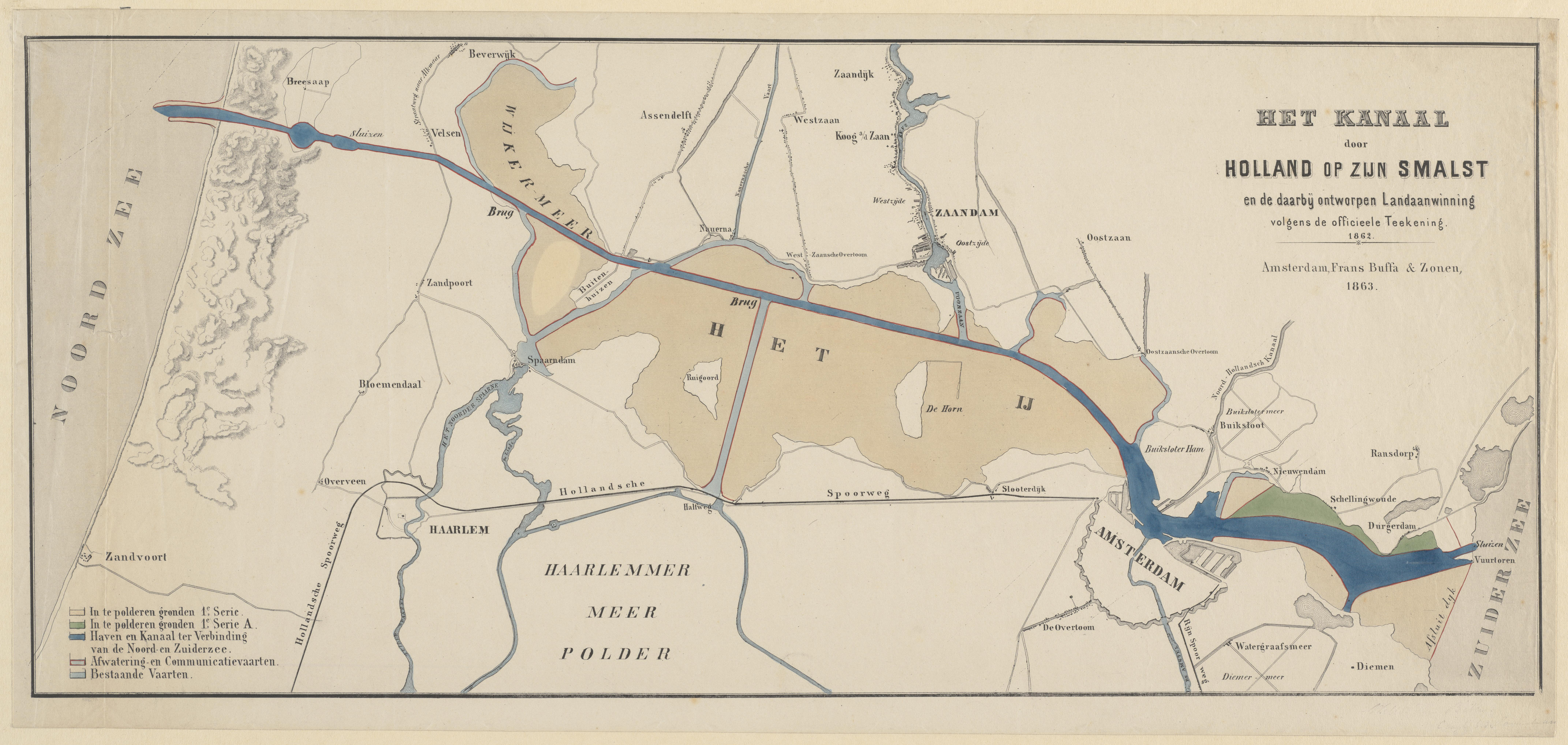 Beschrijving Kanaal door Holland op zijn smalst en de daarbij ontworpen Landaanwinning volgens de officieele Teekening 1862 Documenttype kaart Vervaardiger Buffa en Zonen Collectie Collectie Koninklijk Oudheidkundig Genootschap Datering 1863 Inventarissen Afbeeldingsbestand KOG-AA-3-04-46